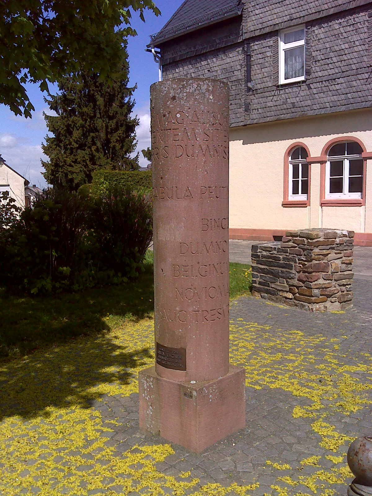 Kopie eines Römischen Meilensteins in Kirchberg (Hunsrück) Gestiftet von Erwin Wagner Ehrenbürger der Stadt Kirchberg 1996